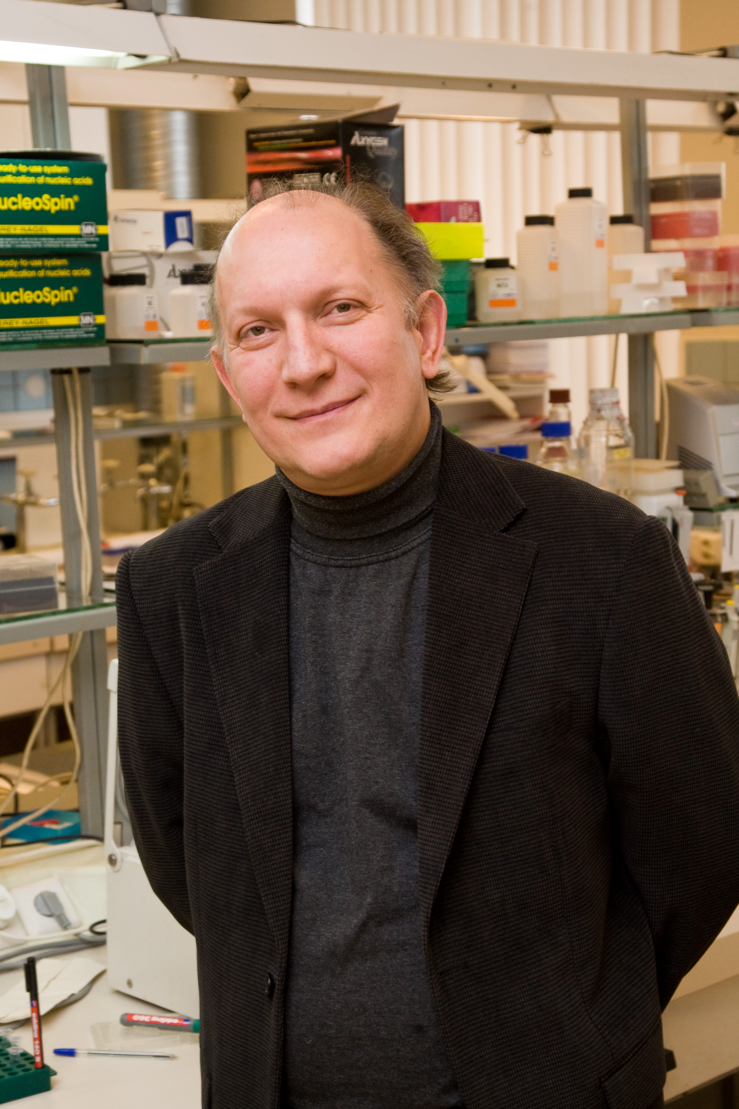 Tartu Ülikooli molekulaar- ja rakubioloogia instituudi biotehnoloogia õppetool. Molekulaarse biotehnoloogia uurimisgrupi juhataja prof Ants Kurg.